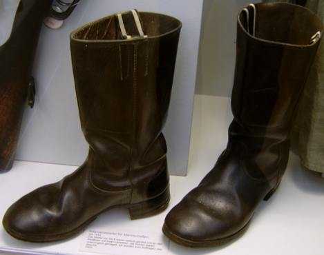 Stiefel 1914 (Garnisonmuseum Ludwigsburg)